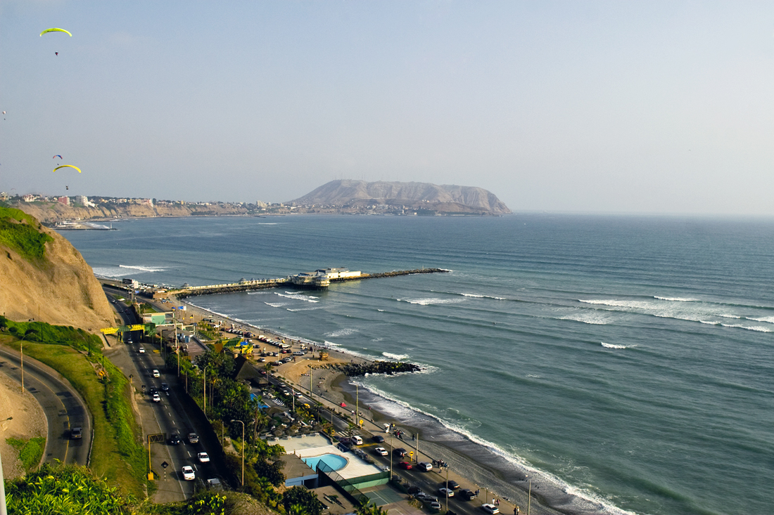 circuito de la Costa Verde.